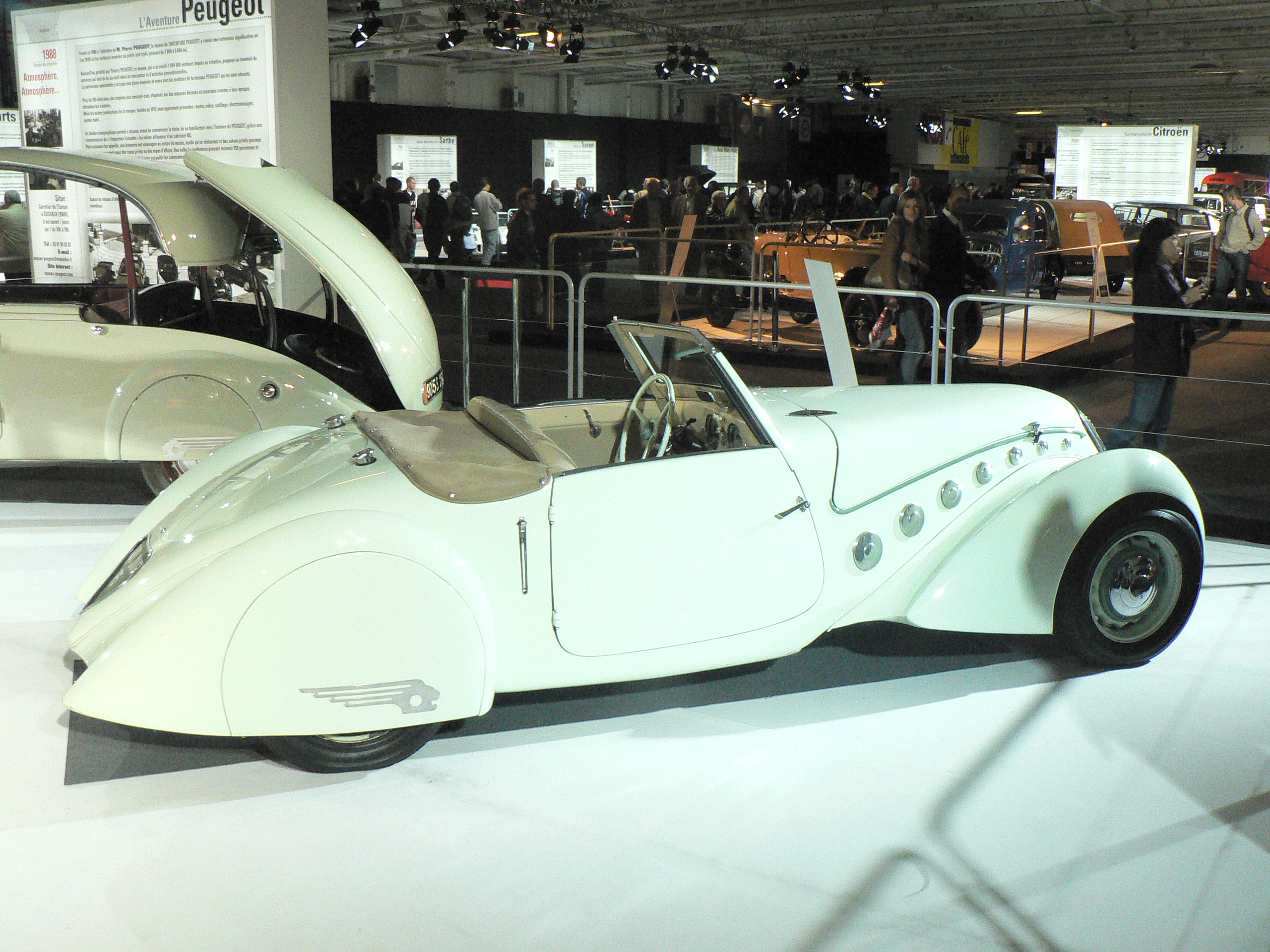 Mondial de l automobile de Paris (October 2006)